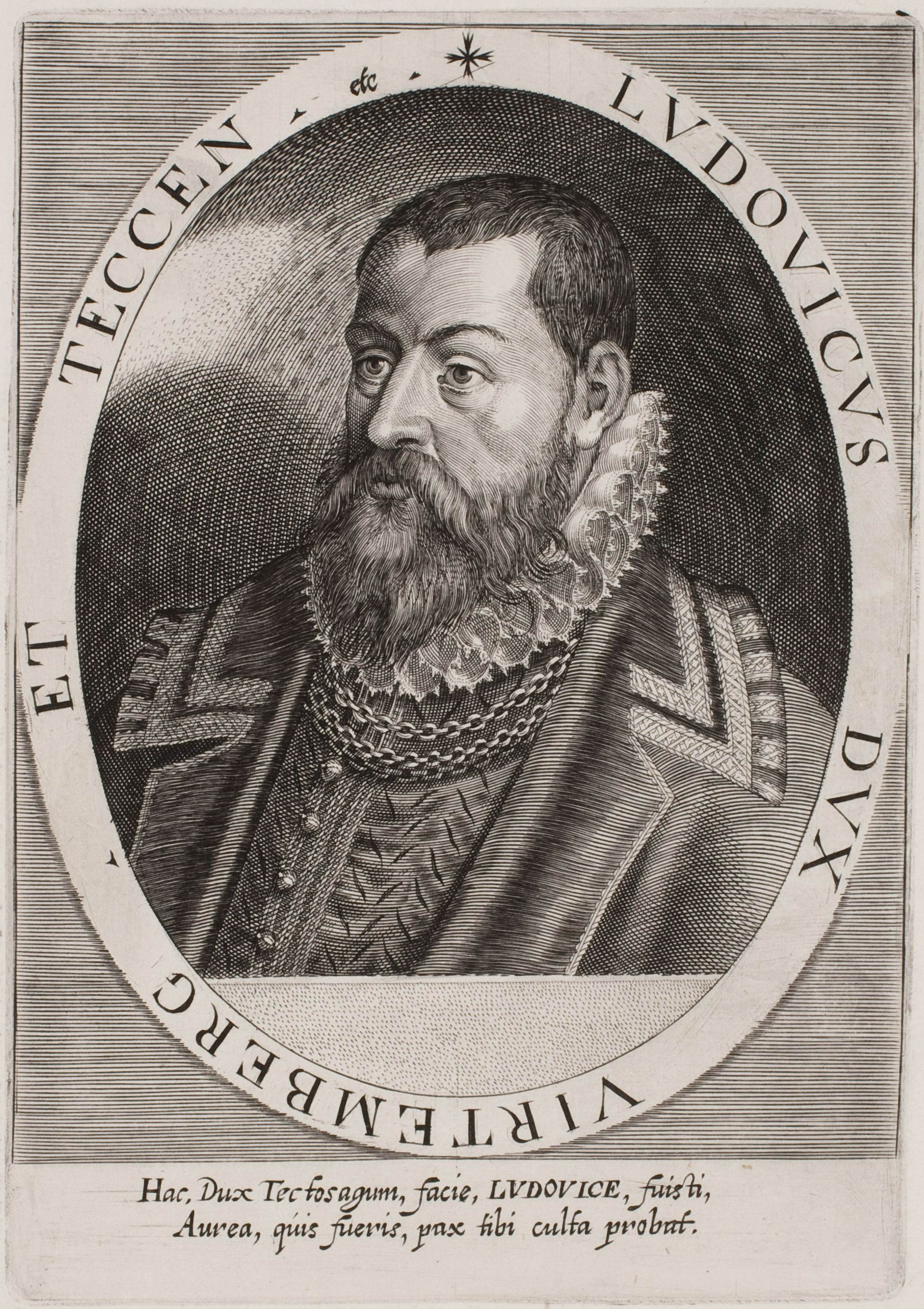 Bildnis Ludwig, Herzog von Württemberg (reg. 1568(78)-93) Wolfenbüttel, Herzog August Bibliothek, Inv.-Nr. A 24469